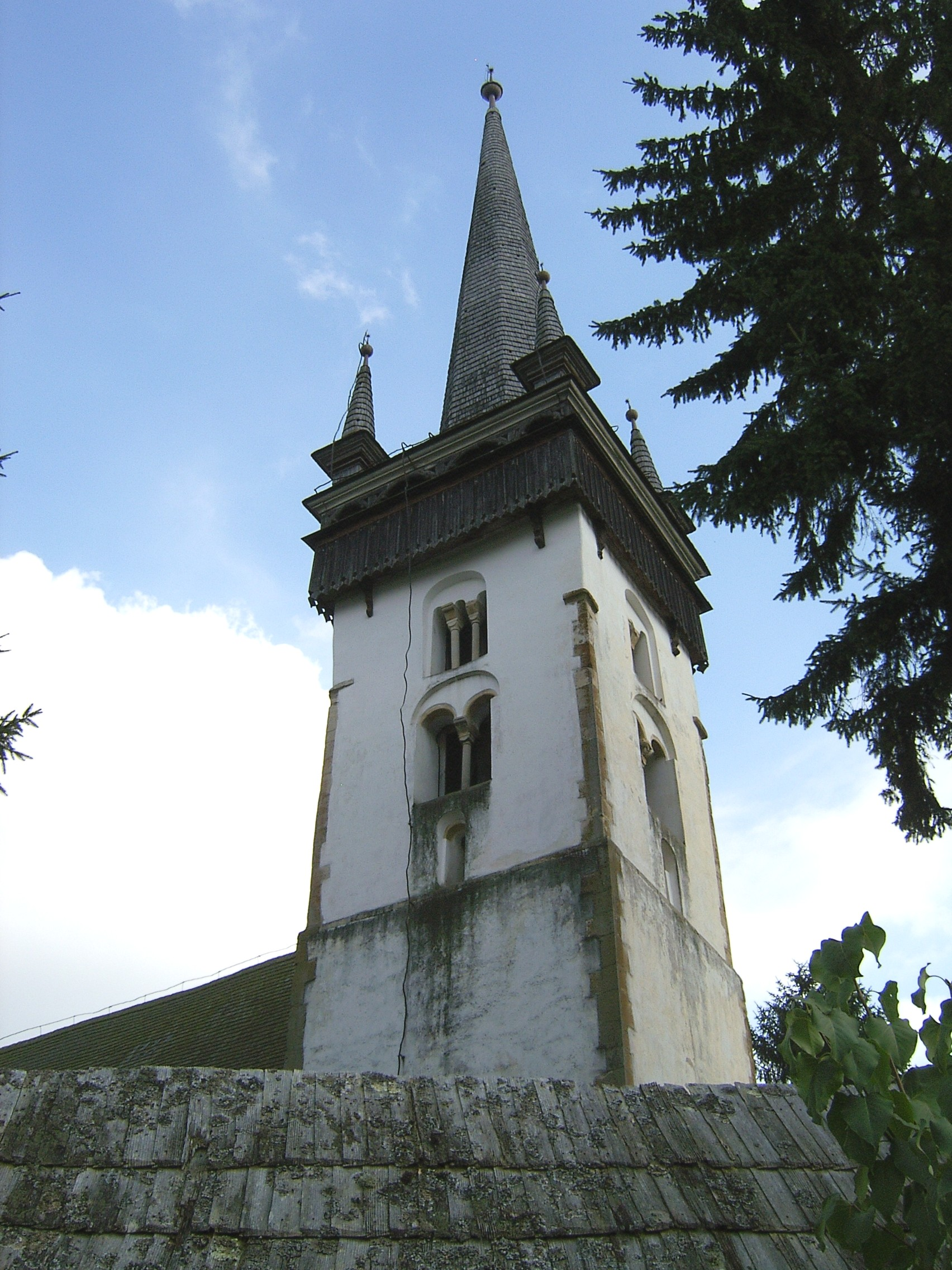 Reformed church in Mănăstireni, Cluj county, Romania